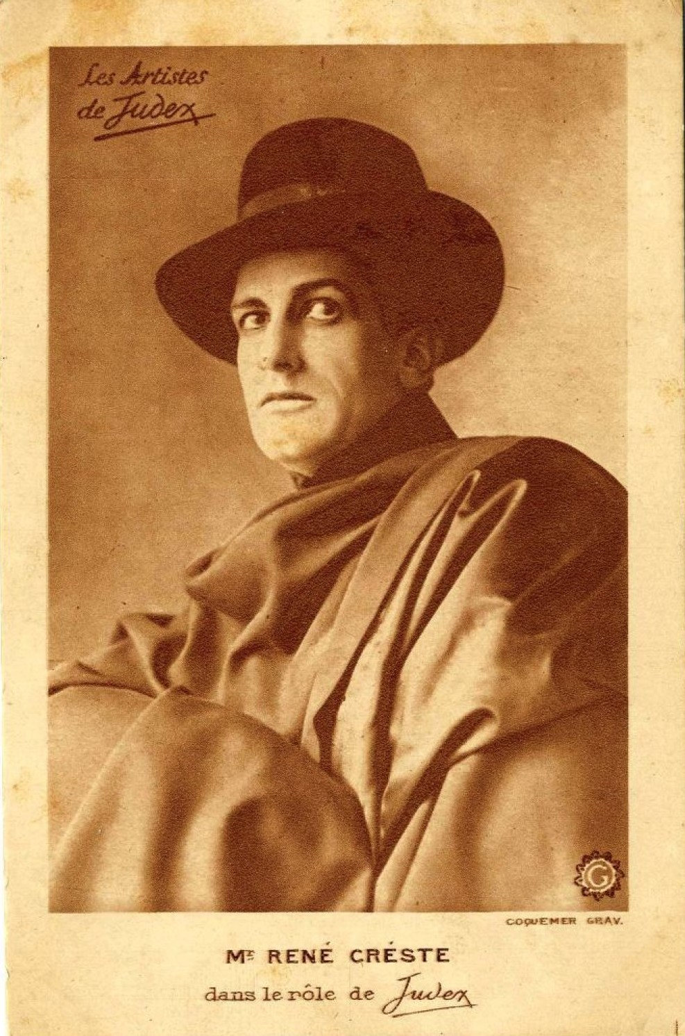 René Cresté dans Judex. Carte postale, 1916.